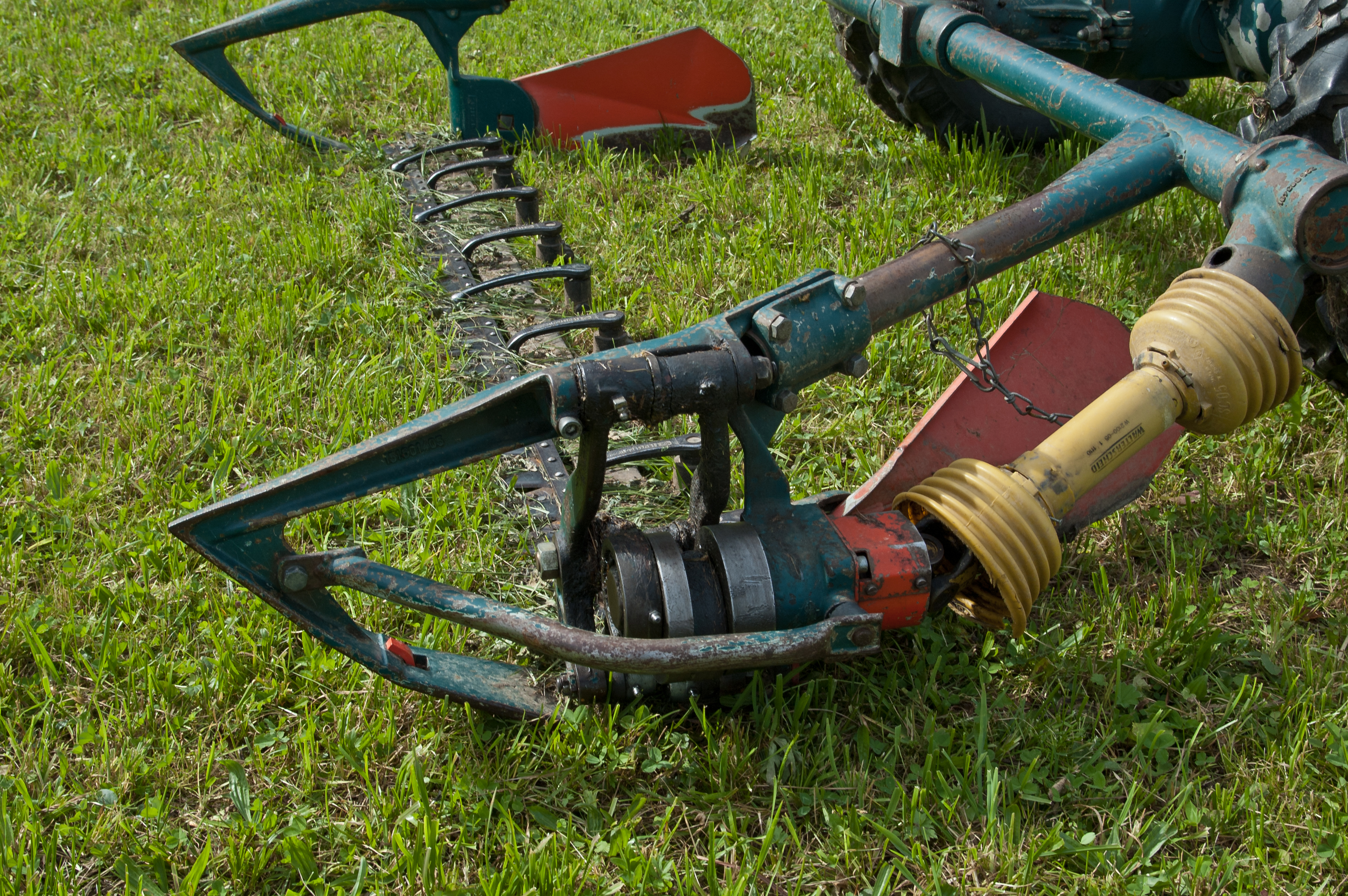 Motormäher auf einer Wiese im Berchtesgadener Land mit Busatis-Doppelmessermähbalken